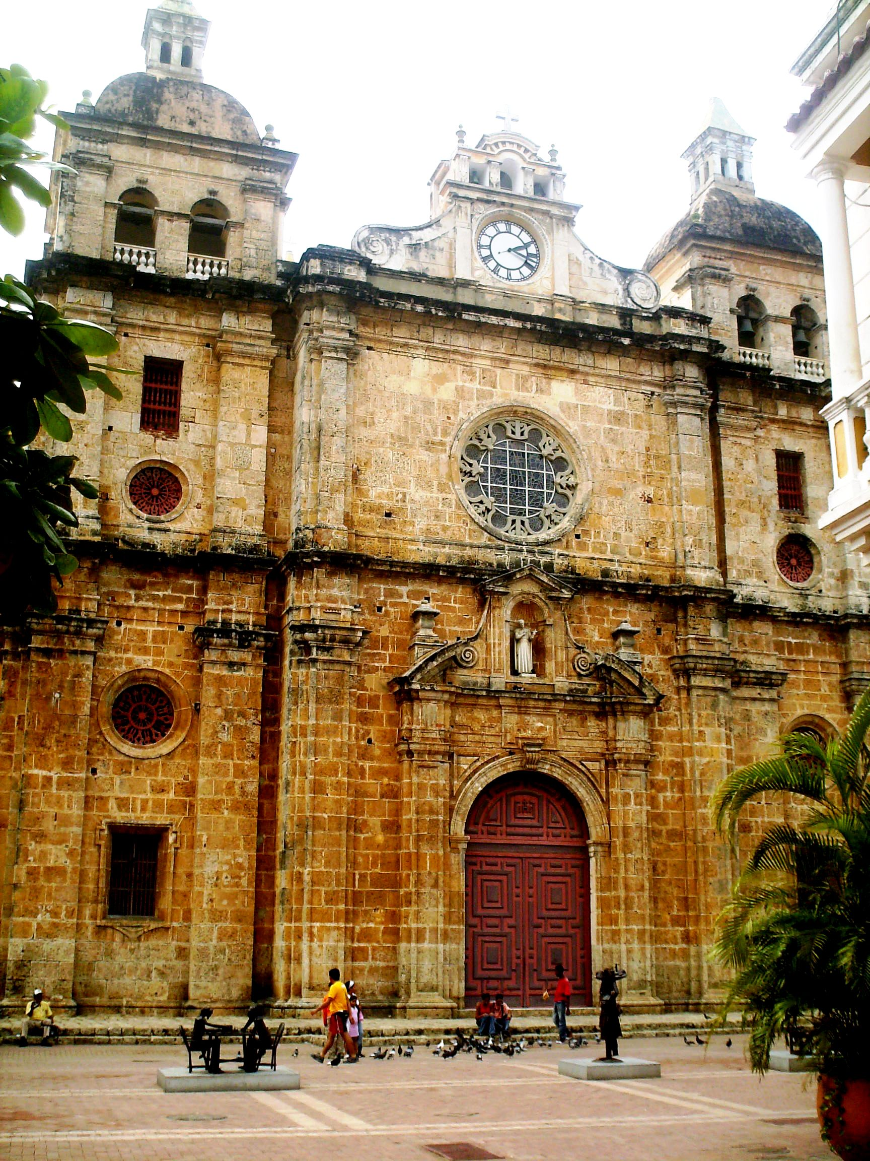 Iglesia colonial de San Pedro Claver en Cartagena de Indias